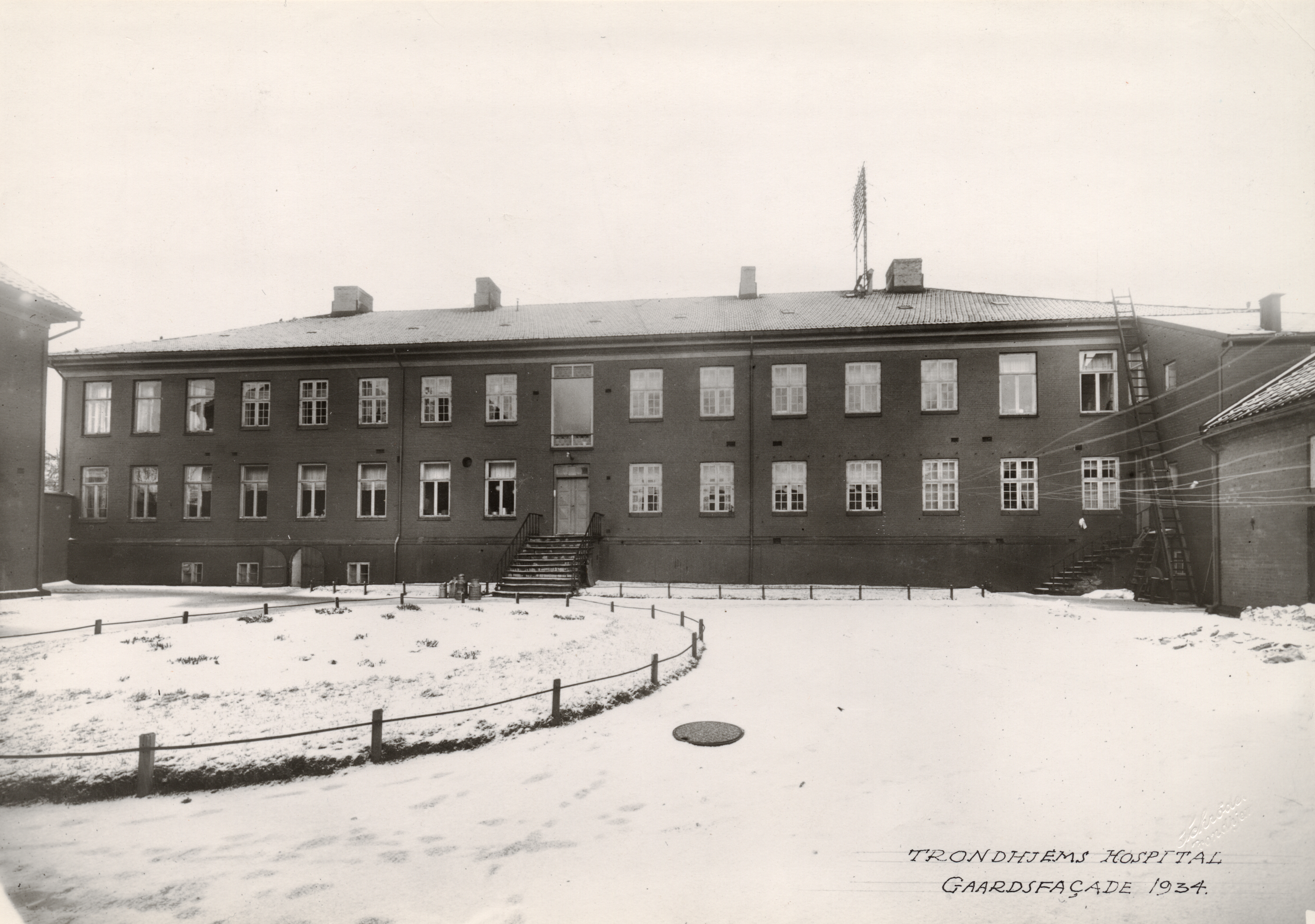 Trondheims hospital i Trondheim, Sør-Trøndelag Gaardsfacade 1934. Schrøder, Trondhjem